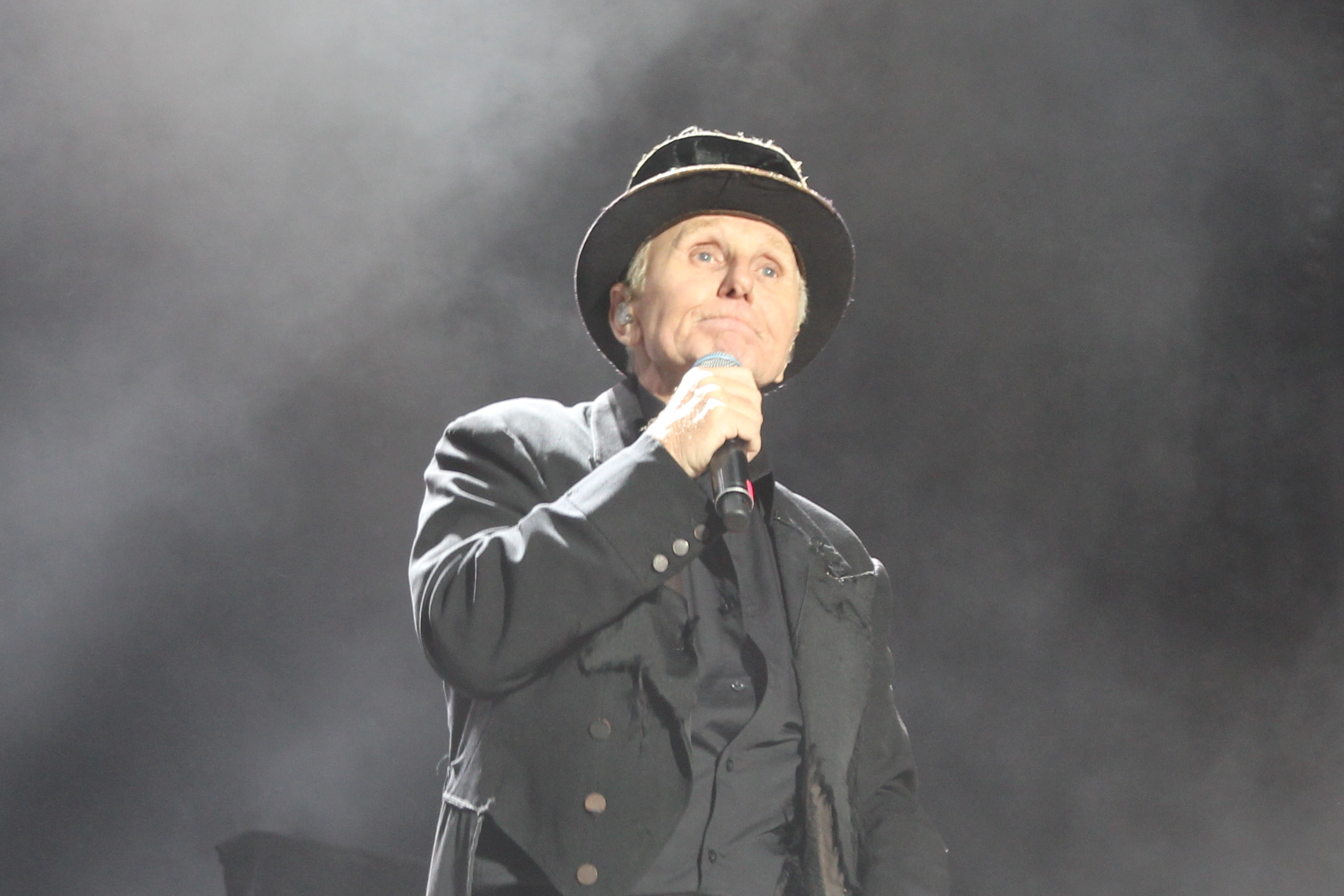 Festivalsommer This photo was created with the support of donations to Wikimedia Deutschland in the context of the CPB project "Festival Summer". Personality rights warningAlthough this work is freely licensed or in the public domain, the person(s) shown may have rights that legally restrict certain re-uses unless those depicted consent to such uses. In these cases, a model release or other evidence of consent could protect you from infringement claims.